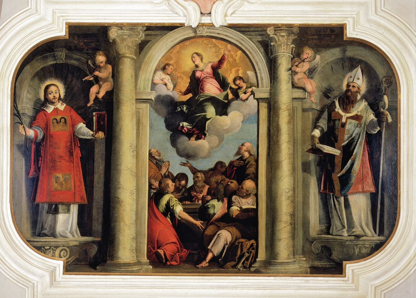 Giovanni Giuseppe Cosattini Pala dell'Assunzione e, ai lati, i Santi Ermacora e Fortunato, 1668 ca., chiesa della Carità alle Zitelle, Udine